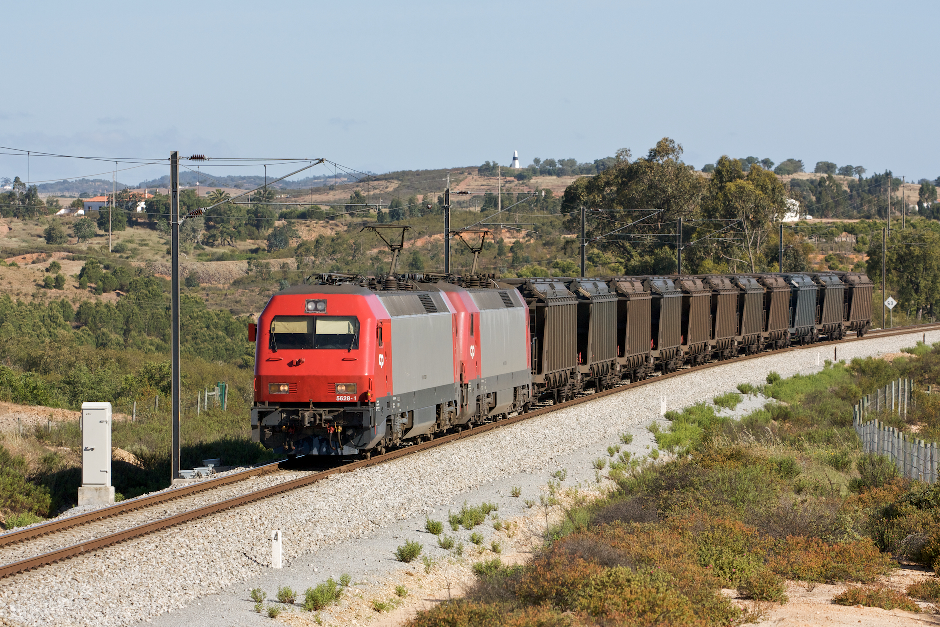 Tipo: Comboio de Transporte de Carvão (material vazio) 66580 [Pego - Sines] Local: Lousal [Linha do Sul, PK 126] Data e hora: 19 de Maio de 2009 [09h01] Material: Locomotivas 5628 e 562x + 11 vagões CP Uaoos esta fotografia foi publicada no .